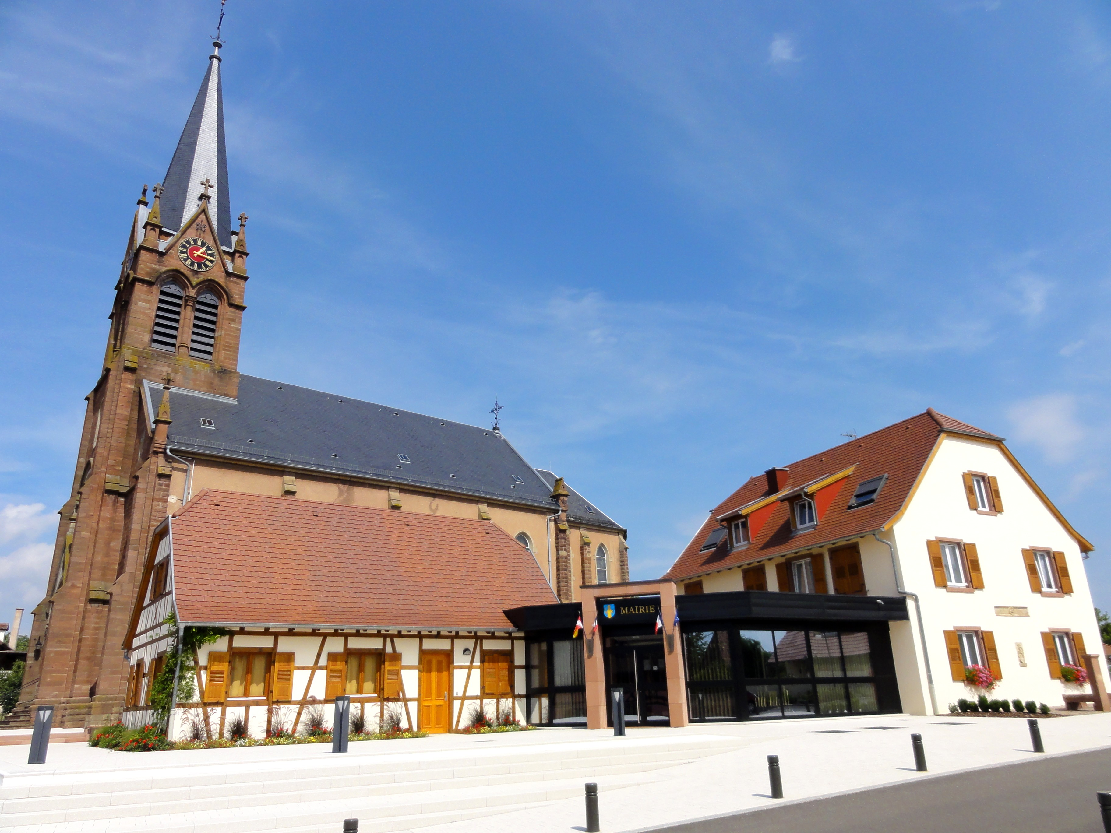 Alsace, Bas-Rhin, Wiwersheim, Église Saint-Cyriaque (IA67001024). Ancien presbytère (XVIe), actuellement mairie, 21 route de Saverne. .